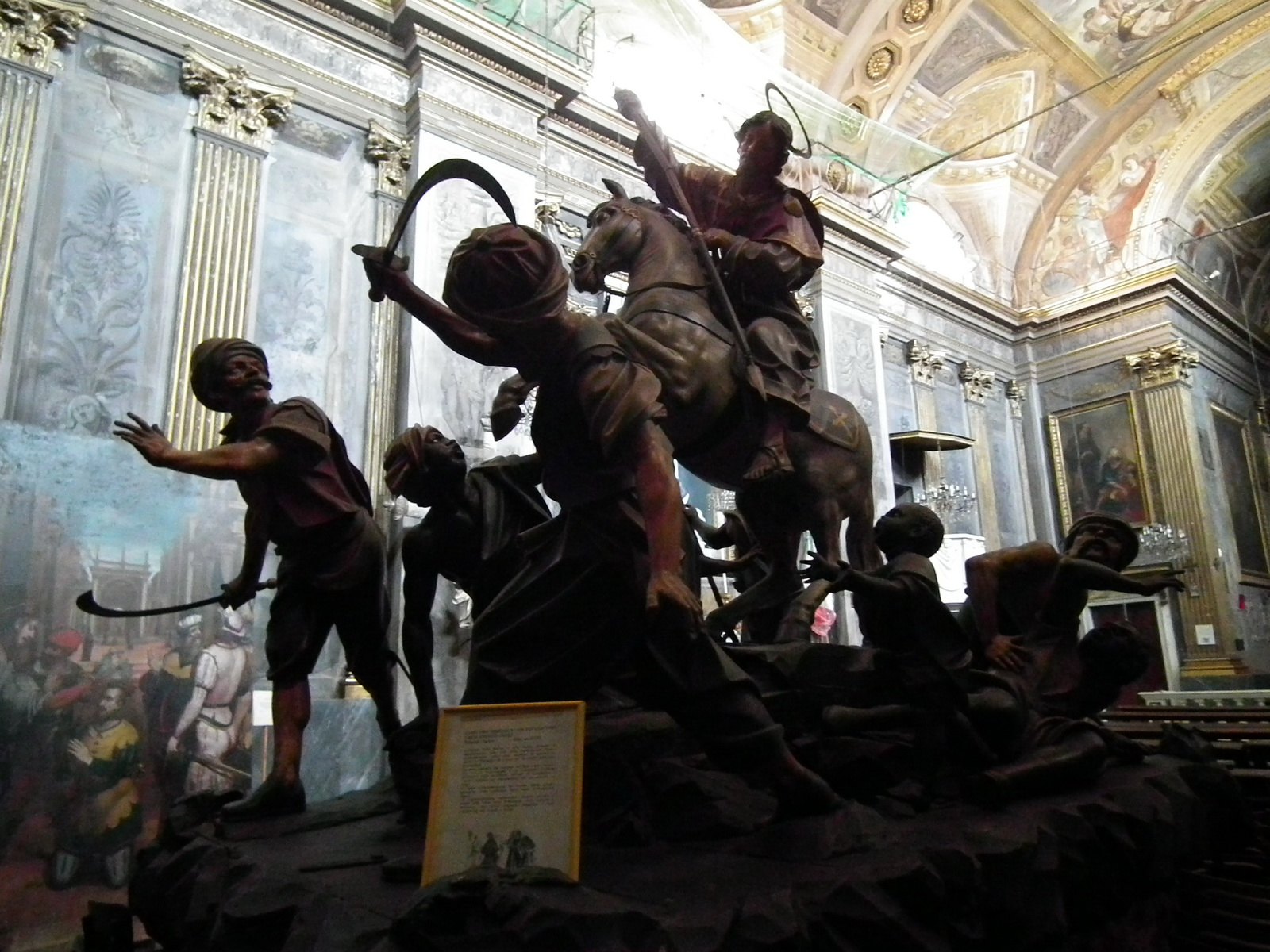 Oratorio di Sant'Antonio Abate, Genoa, Italy